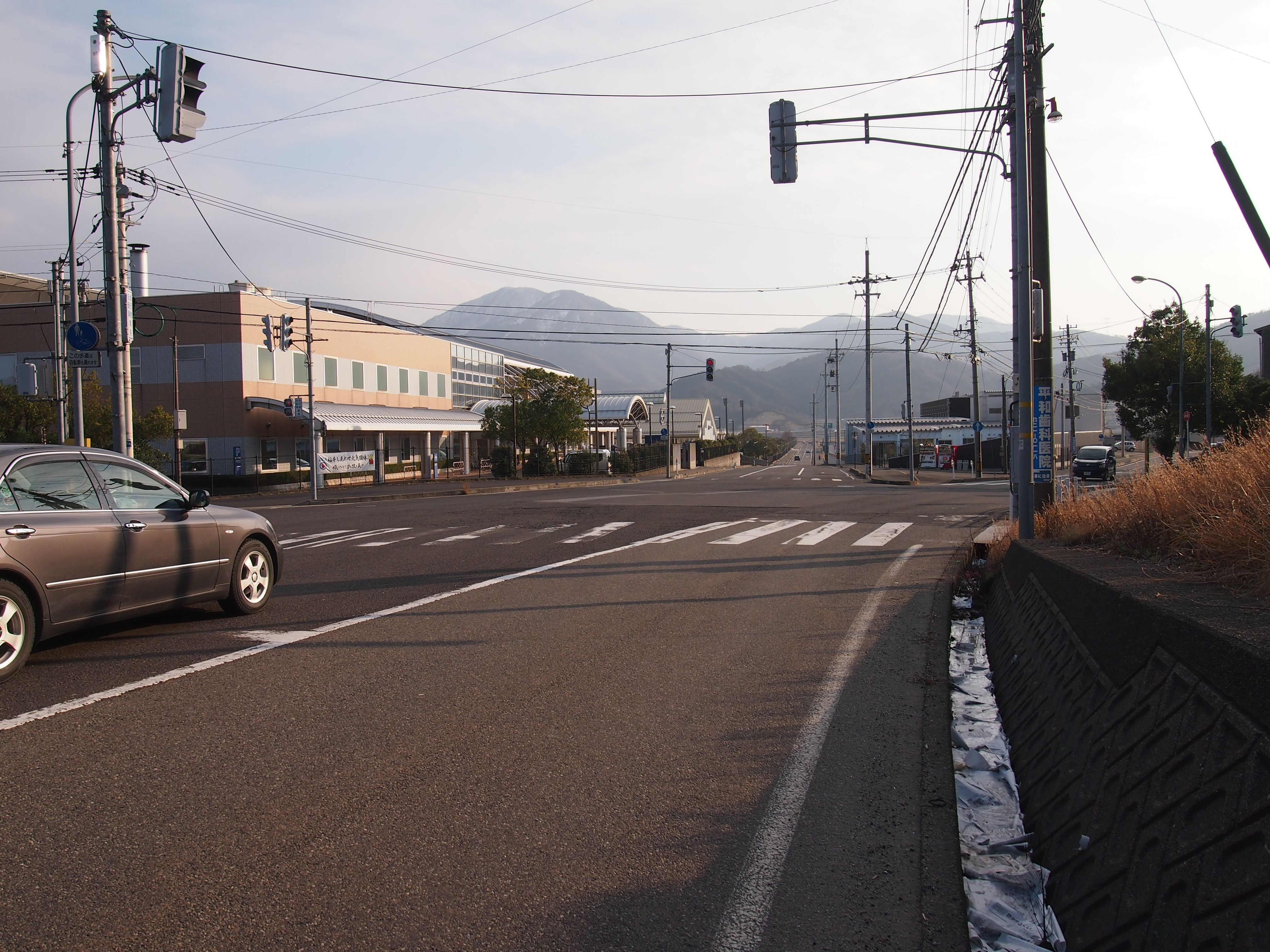 敦賀市馬坂峠、五叉路交差点付近。